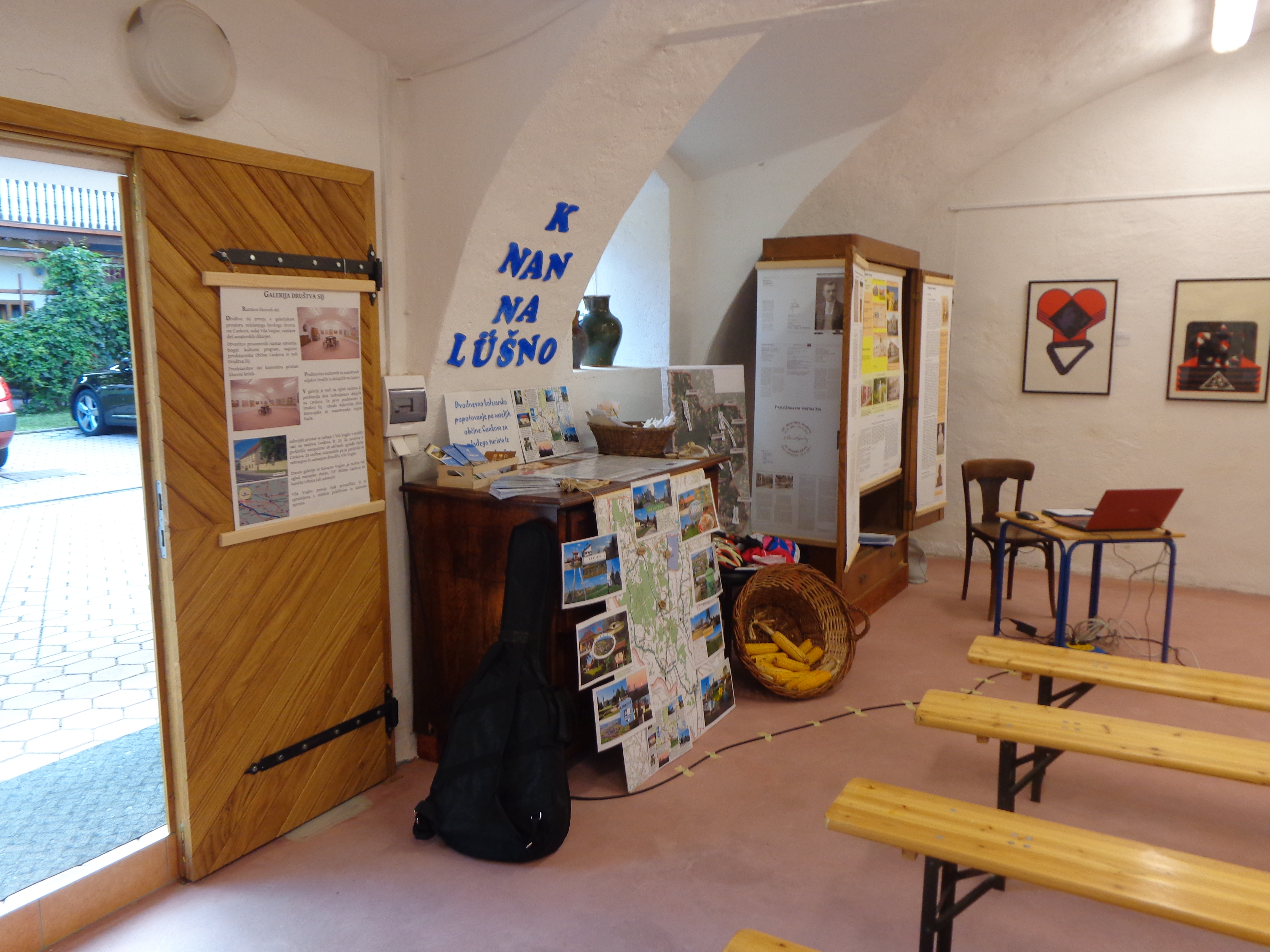 Predstavitev razsikovalnih nalog učencev OŠ Cankova